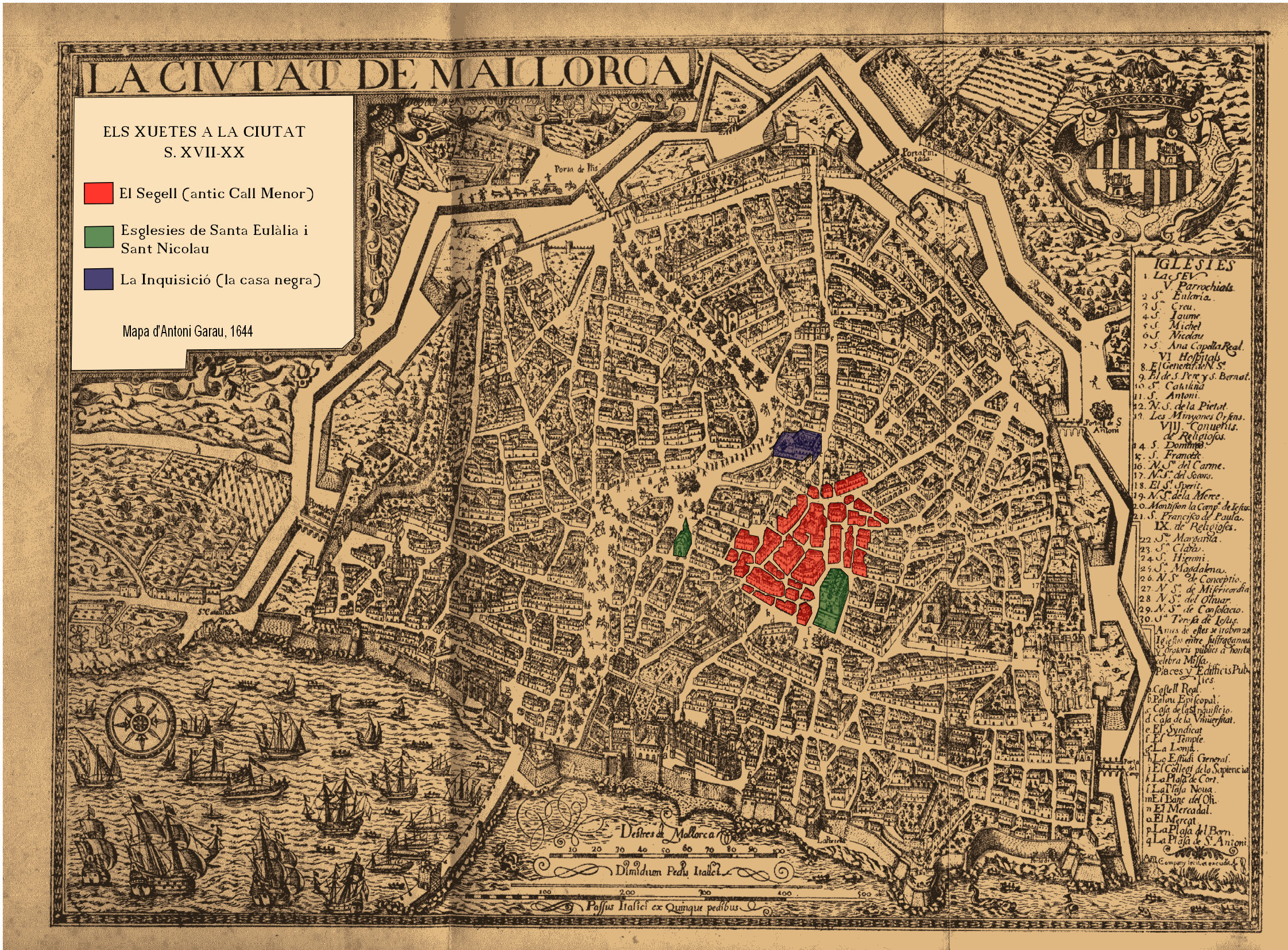 El Barri del Segell sobre el mapa d'Antoni Garau de 1644.